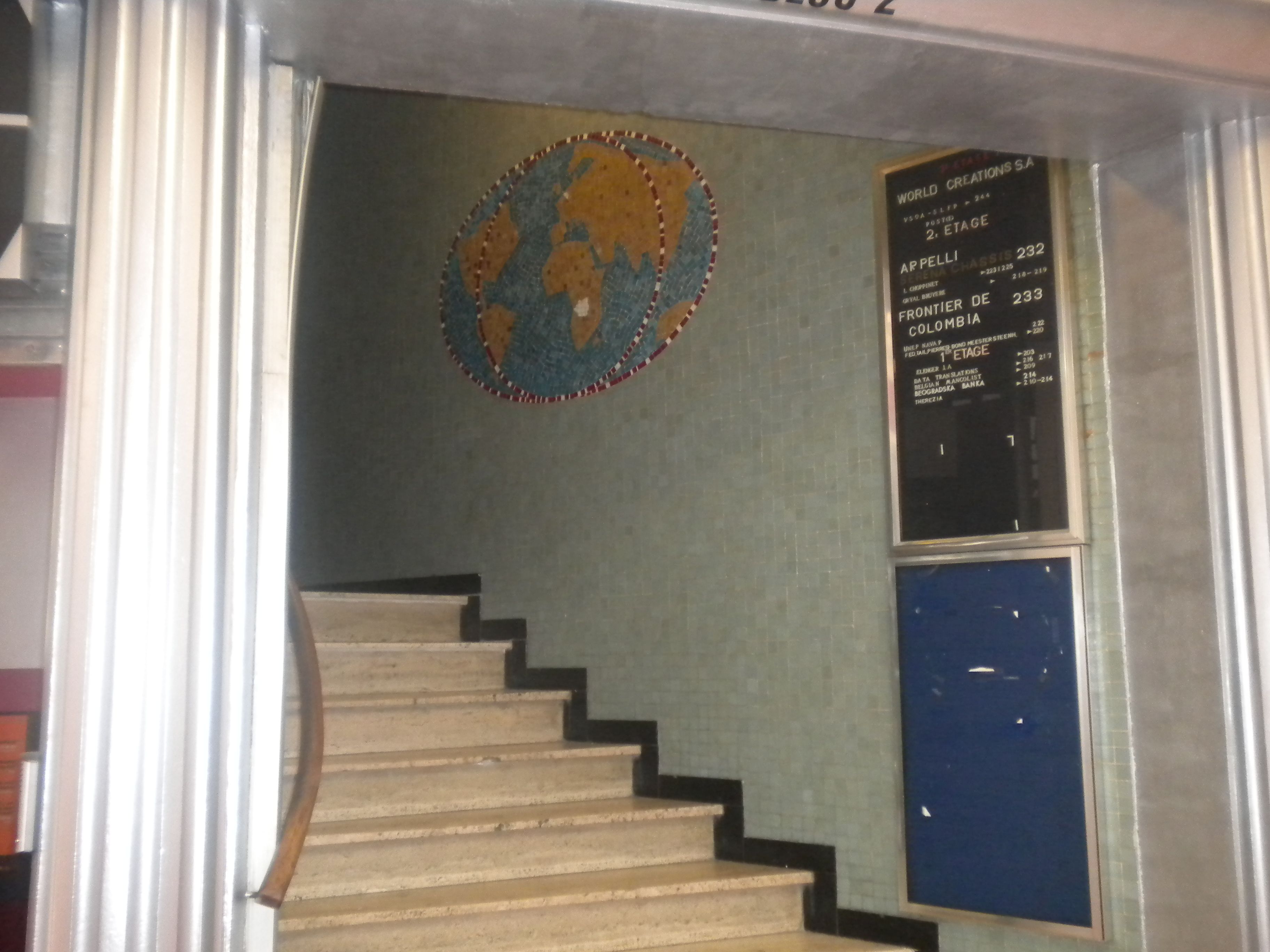 Entrée des premiers locaux des éditions Dupuis et Spirou dans la galerie du Centre à Bruxelles.